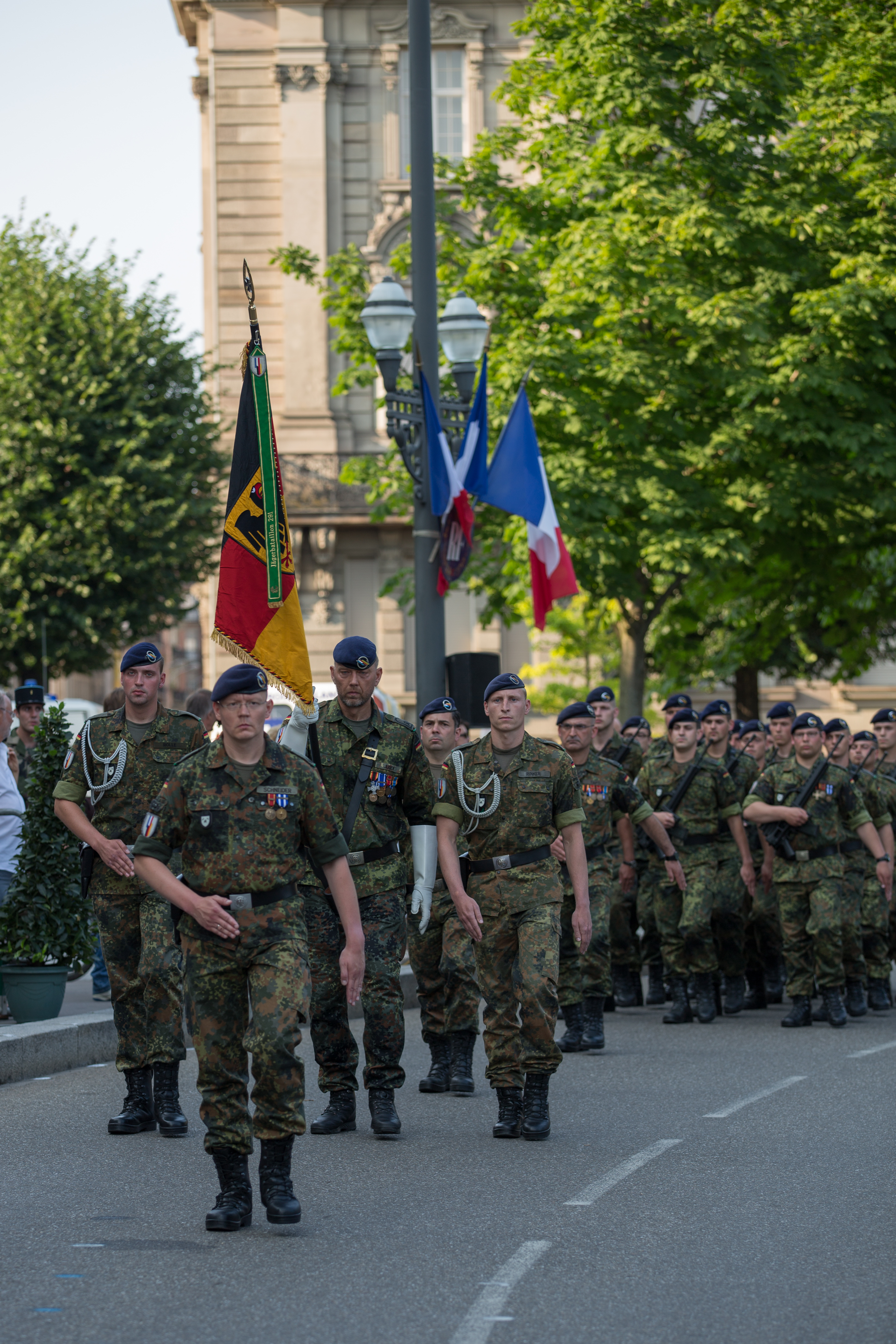 Détachement du 291e Jägerbataillon de la Brigade Franco-Allemande à Strasbourg place de la République lors du défilé du 13 juillet 2013.